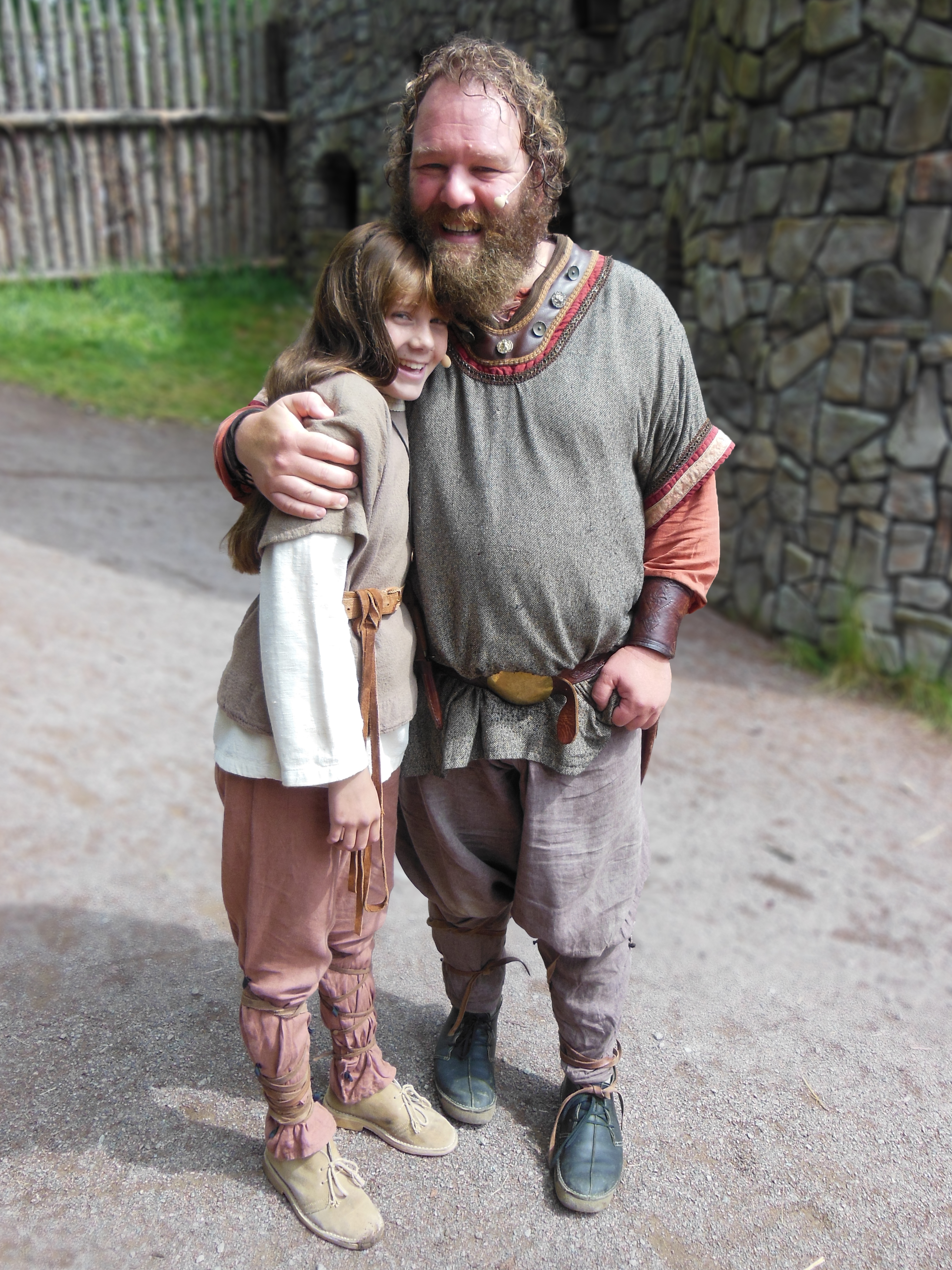 Ronja och hennes pappa Mattis på Astrid Lindgrens Värld i Vimmerby, 2014.